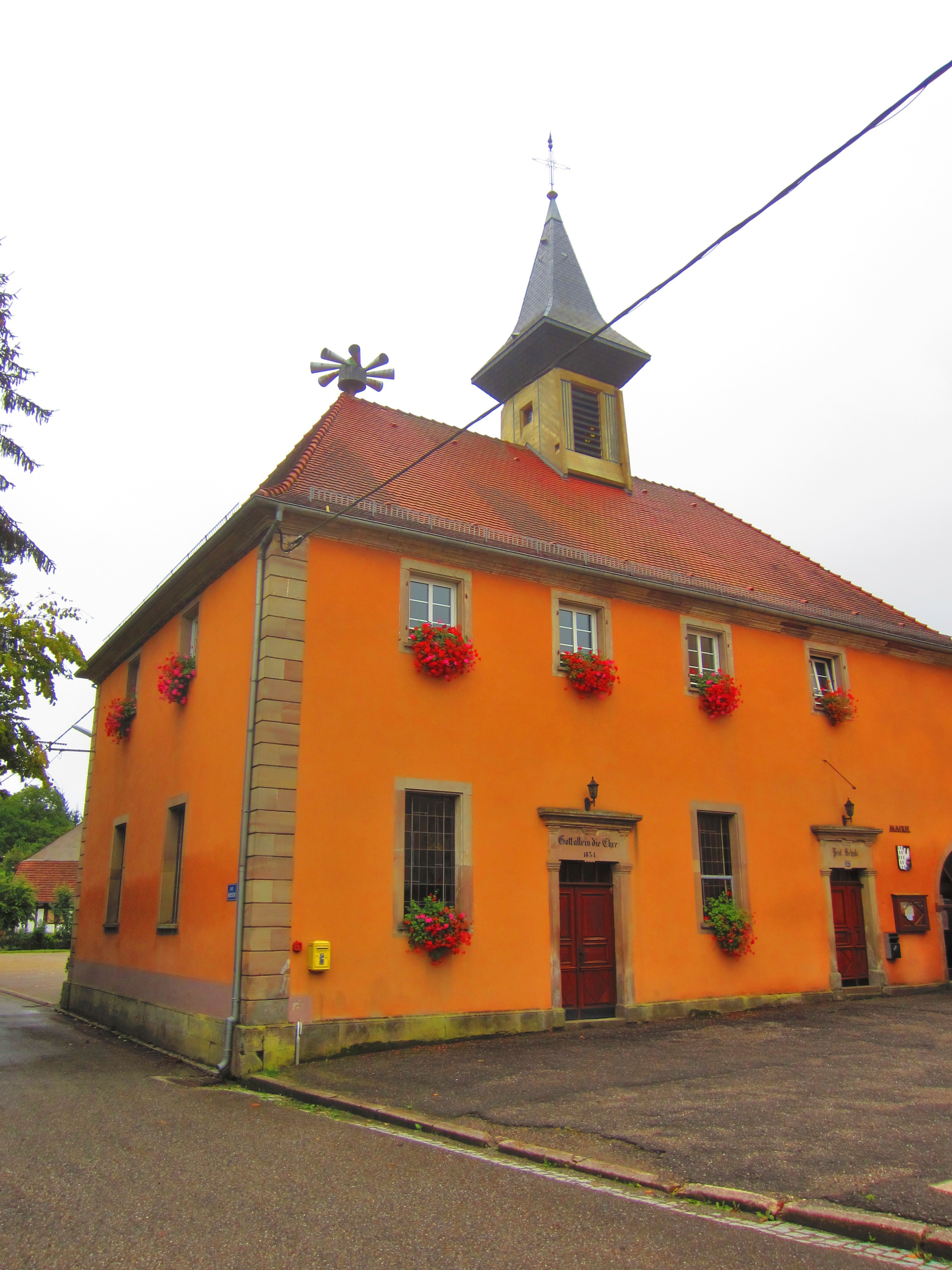 Temple Metting